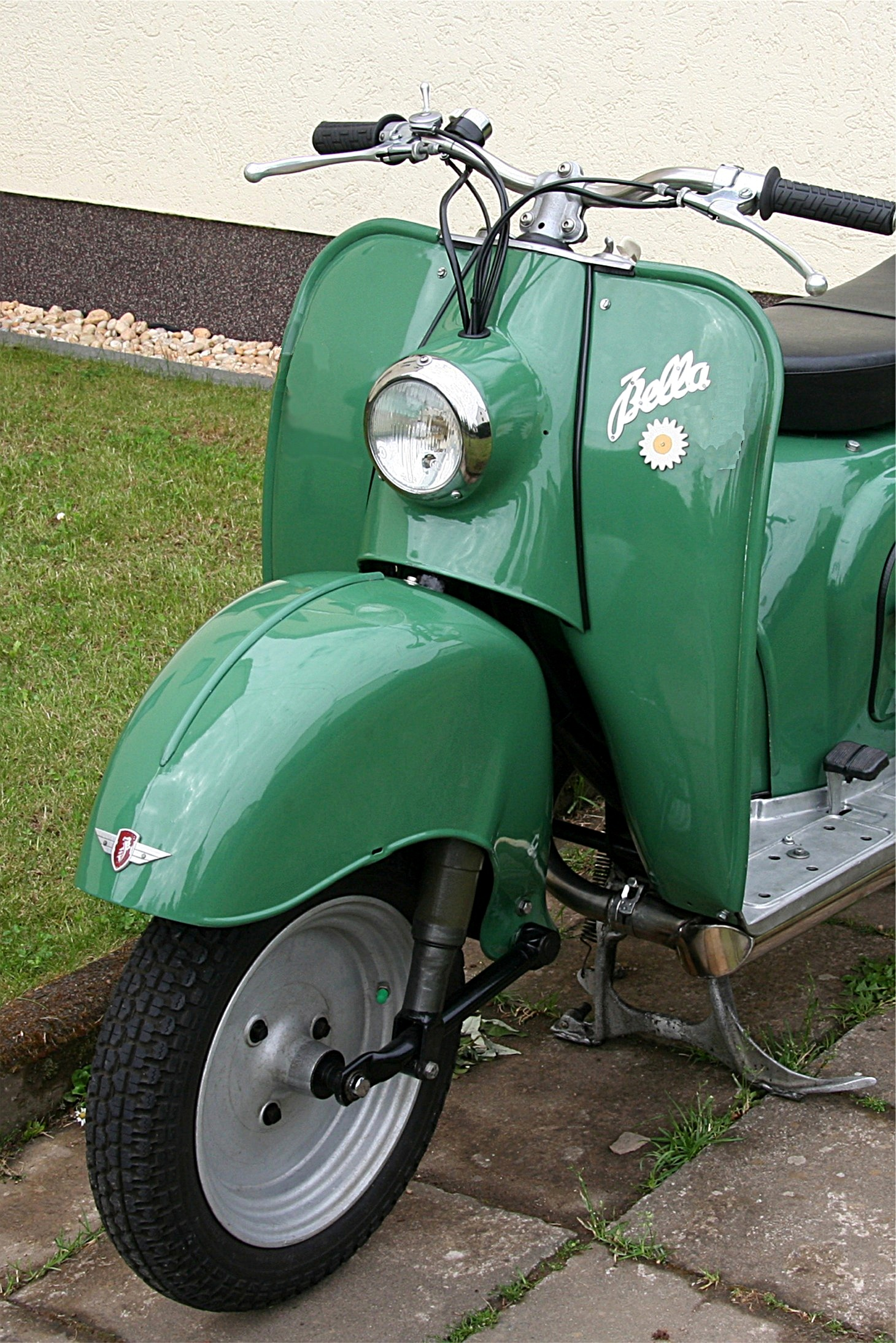 Zündapp Bella R 154, Baujahr 1958 (Vorderradschwinge)